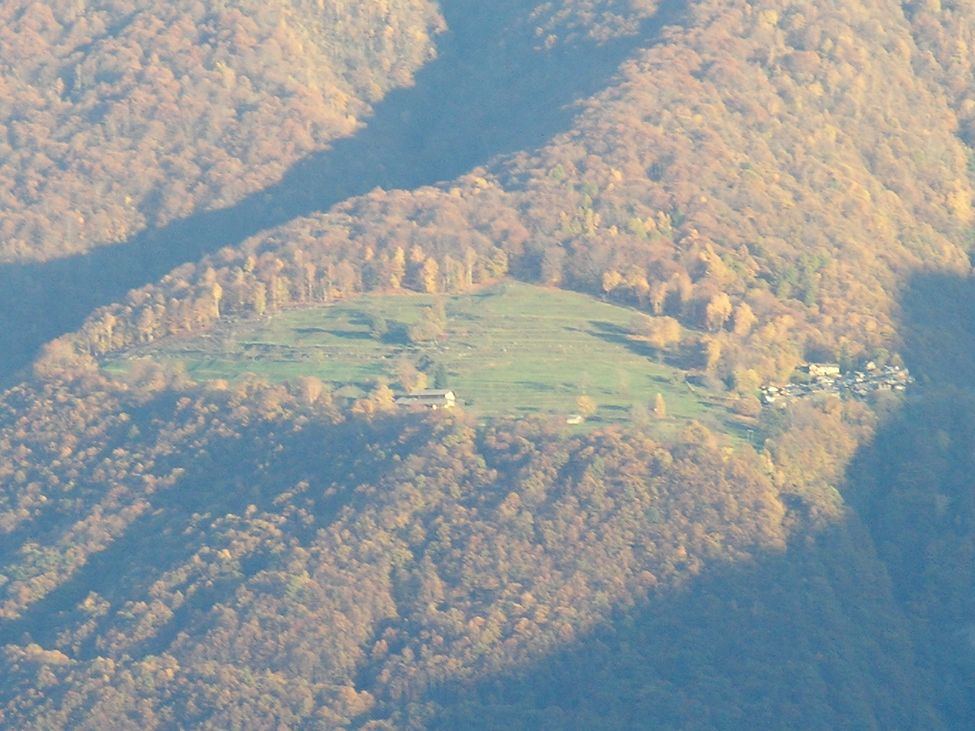 100 Campi autunno